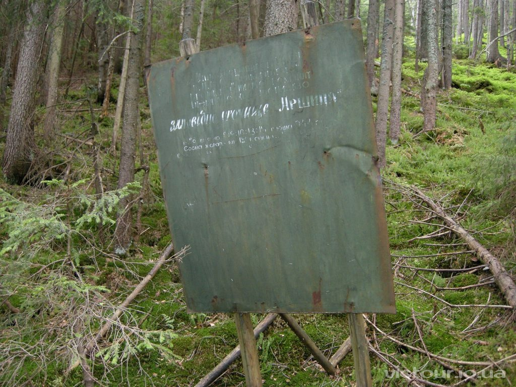 Охоронний знак 197х р.